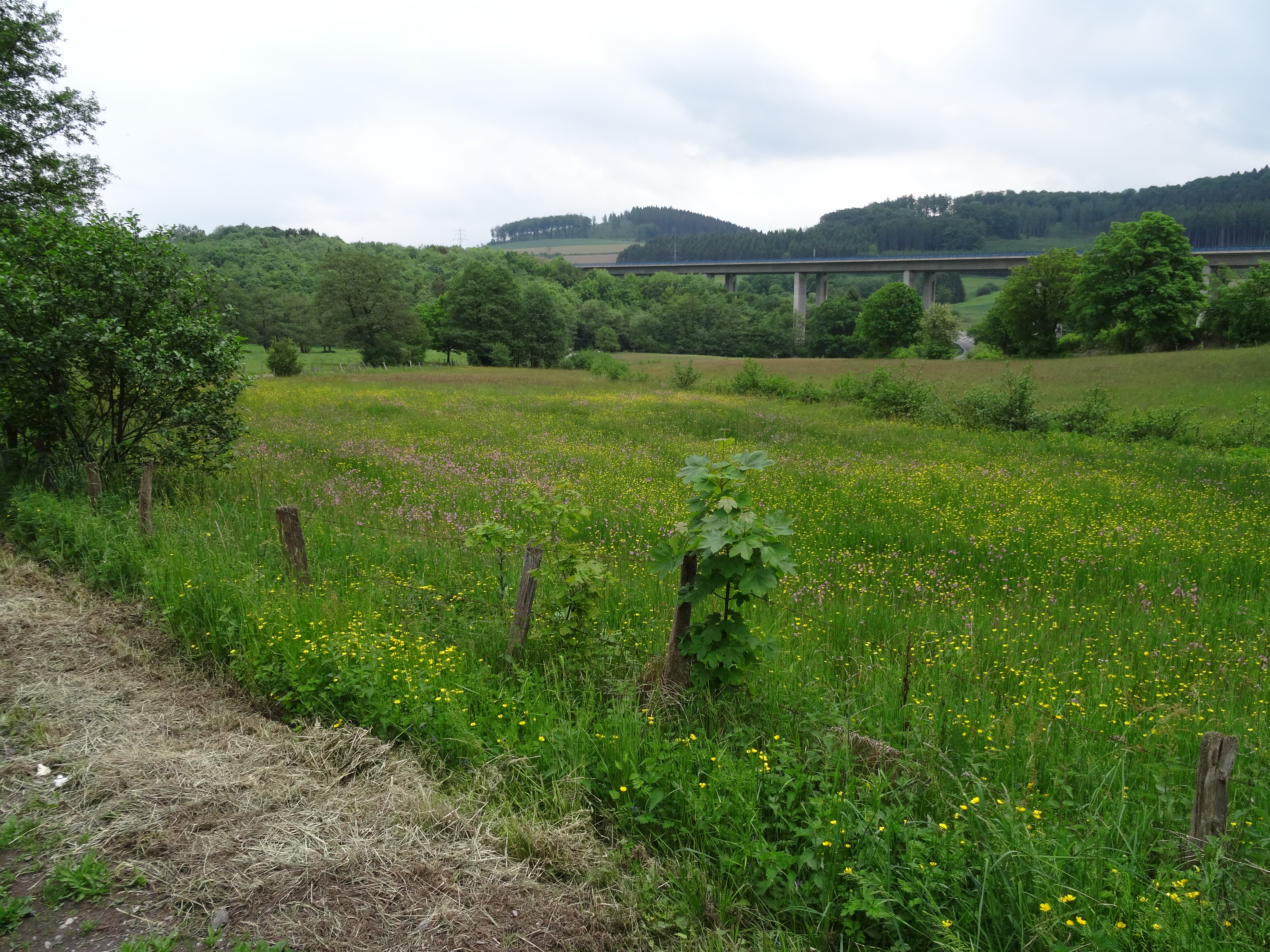 Landschaftsschutzgebiet „Talraum der Kleinen Steinmecke“ in Meschede. Die Kleine Steinmecke mündet nahe der Autobahnbrücke (A46-Talbrücke Kohlwederbach) im Hintergrund in den Kohlwederbach, der von da bis zur Mündung Gebke genannt wird.